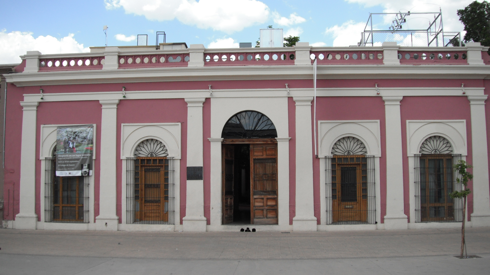 El Colegio de Sonora, Hermosillo, Sonora, México